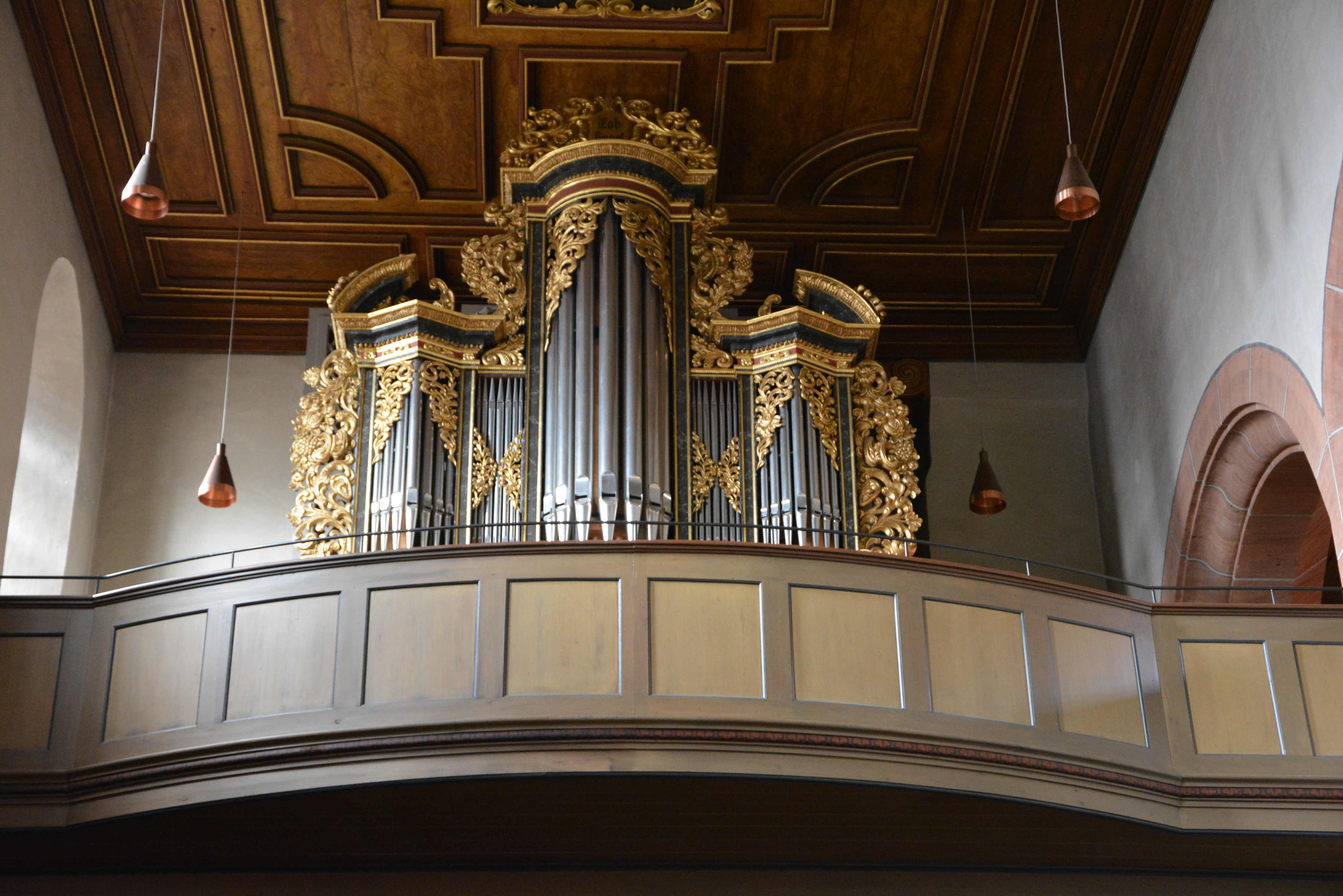 Feuchtwangen StiftskircheThis is a photograph of an architectural monument.